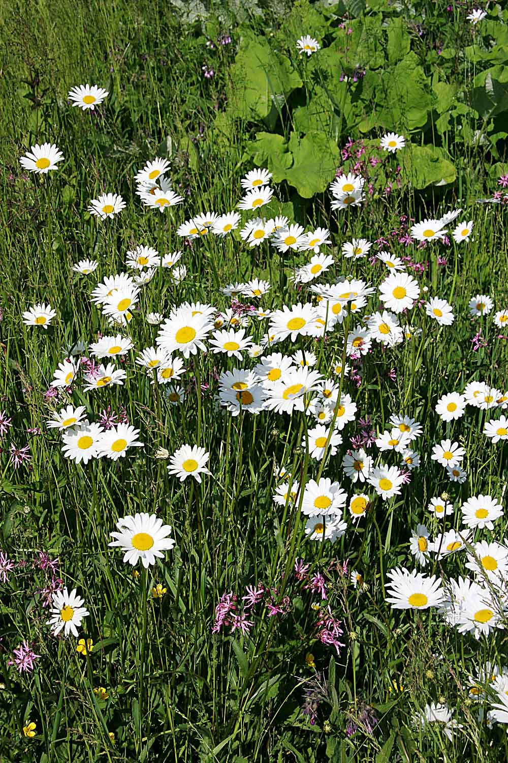 Leucanthemum_vulgare Autor Prazak